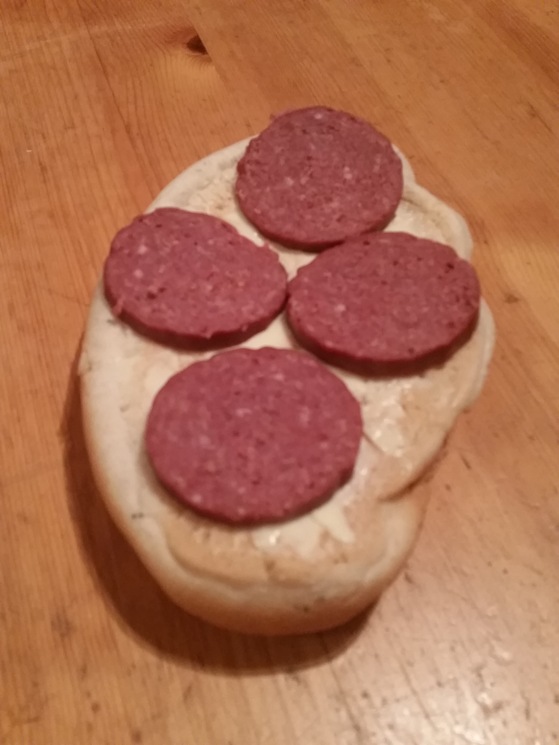 Tekaka med smör och gustafskorv.